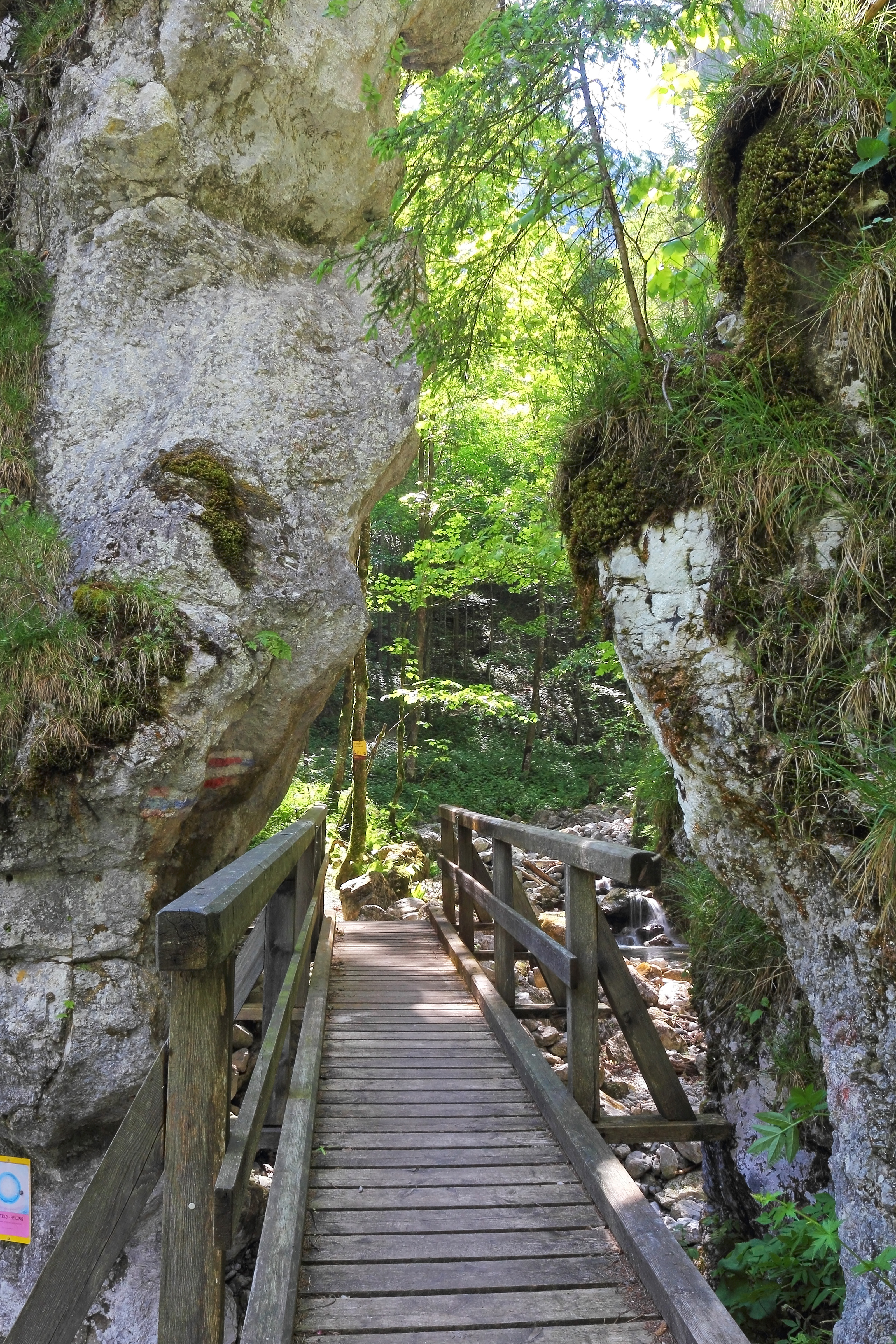 Die Falkenschlucht südlich von Türnitz wurde 1957 zum Naturdenkmal erklärt. This media shows the natural monument in Lower Austria with the ID LF-062.